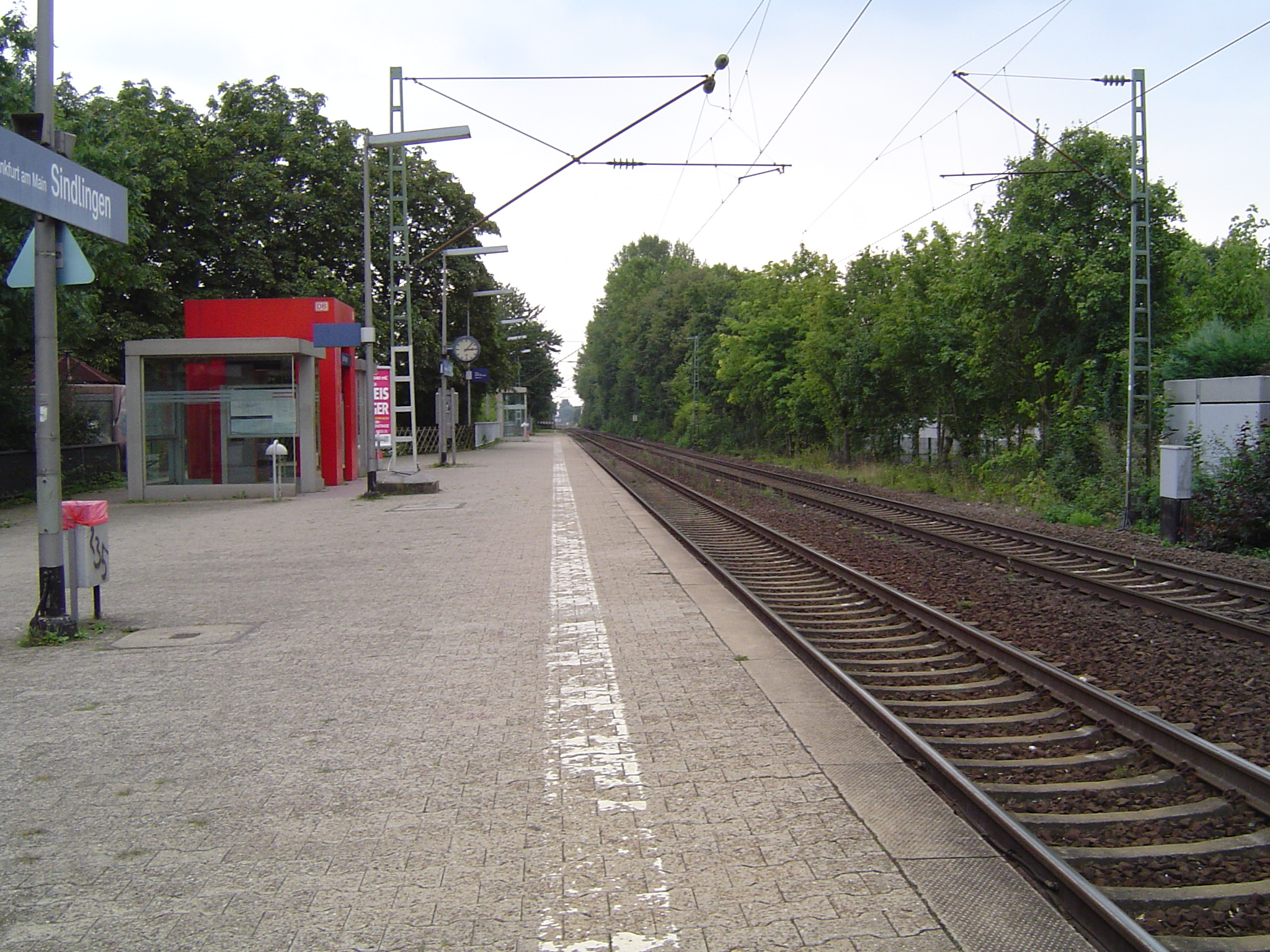 Haltepunkt Frankfurt Sindlingen Gleis 1